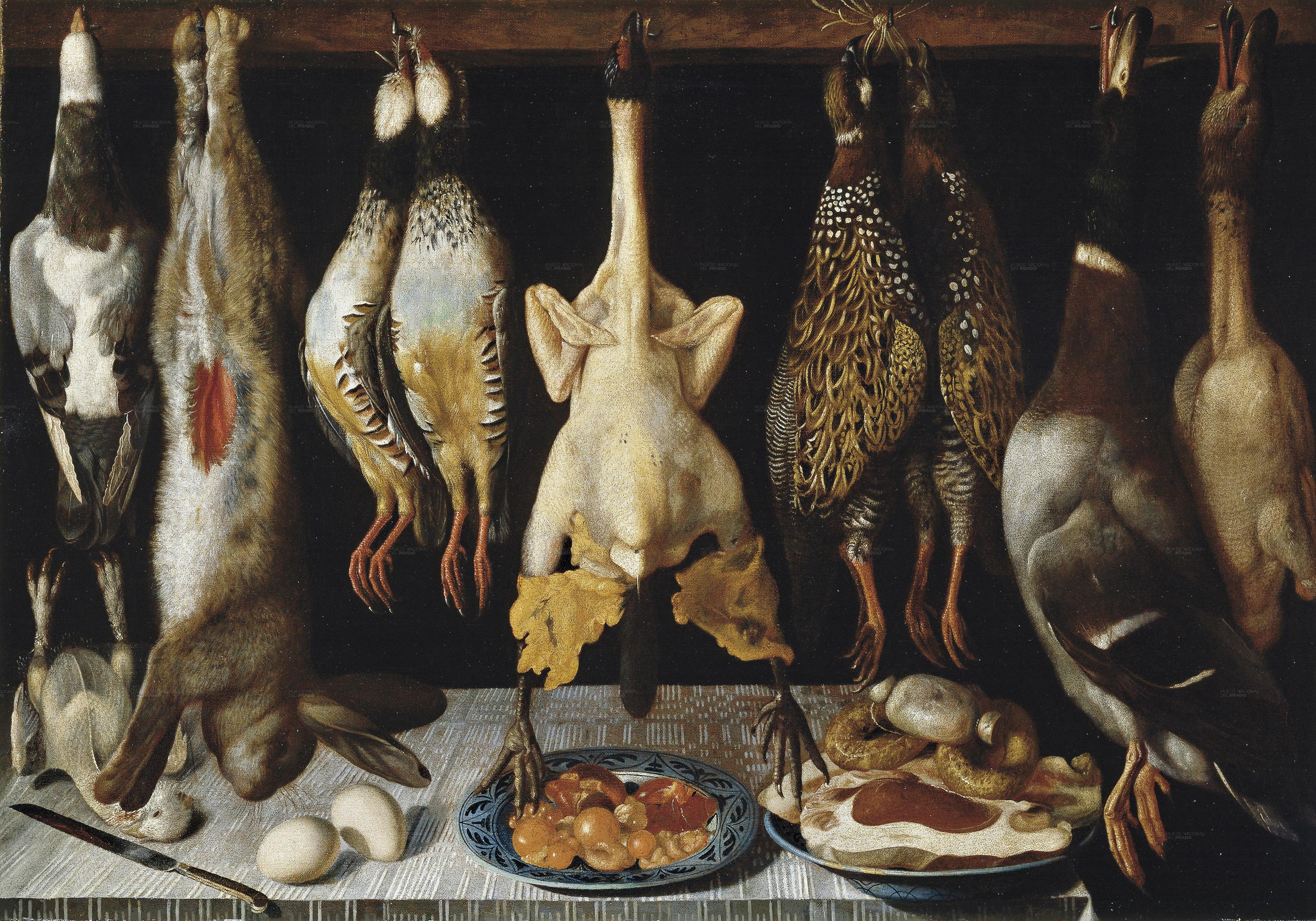 Bodegón de aves y liebrelabel QS:Les,"Bodegón de aves y liebre"